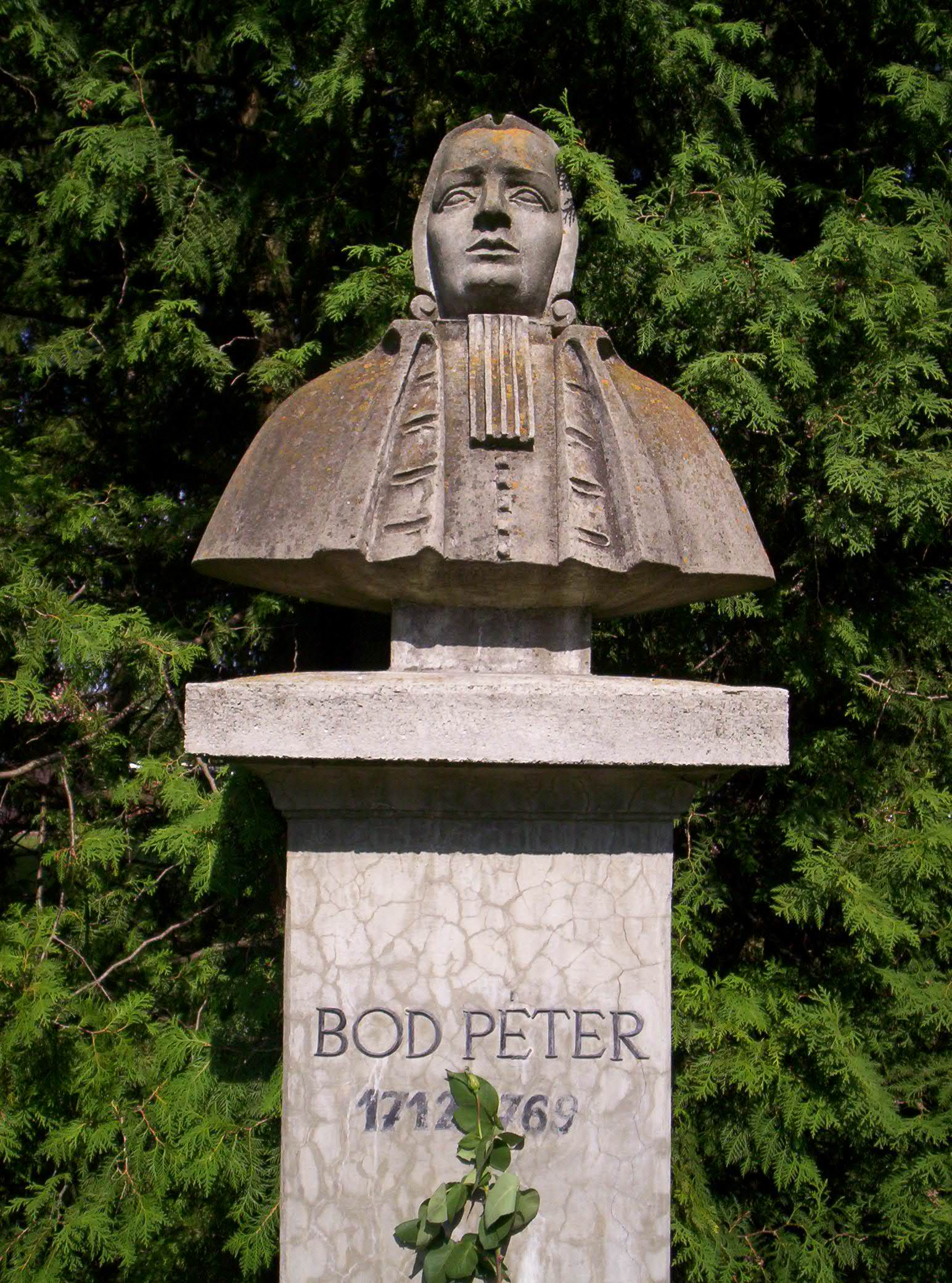 Bod Péter szobra a csernátoni Haszmann Pál Néprajzi Múzeumban – photo taken by uploader User:Csanády in 2006.